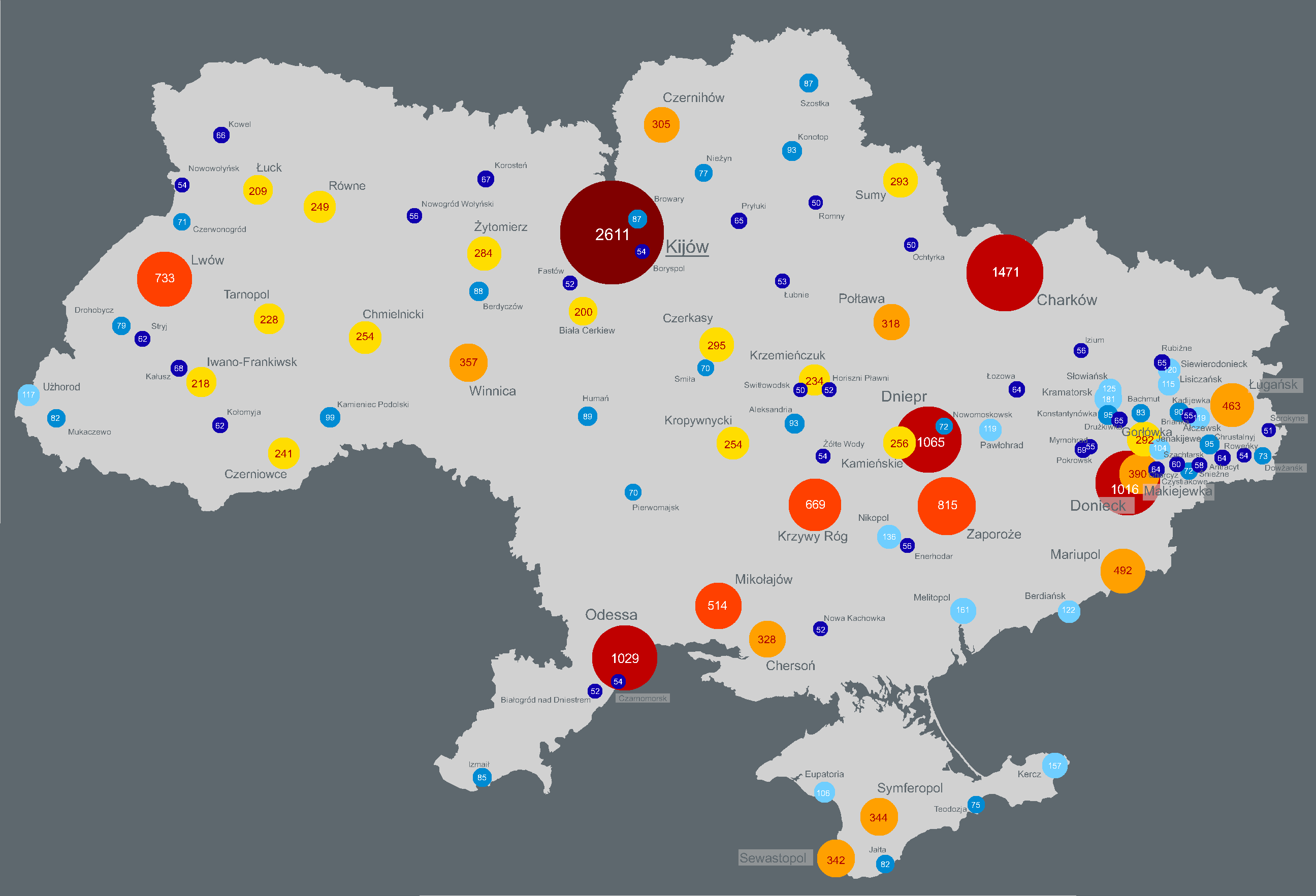 Mapa miast Ukrainy powyżej 50 tys mieszkańców.